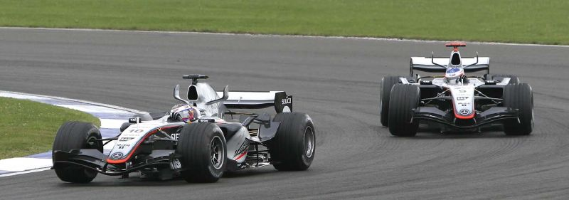 Montoya leads Raikkonen at Britain 2005